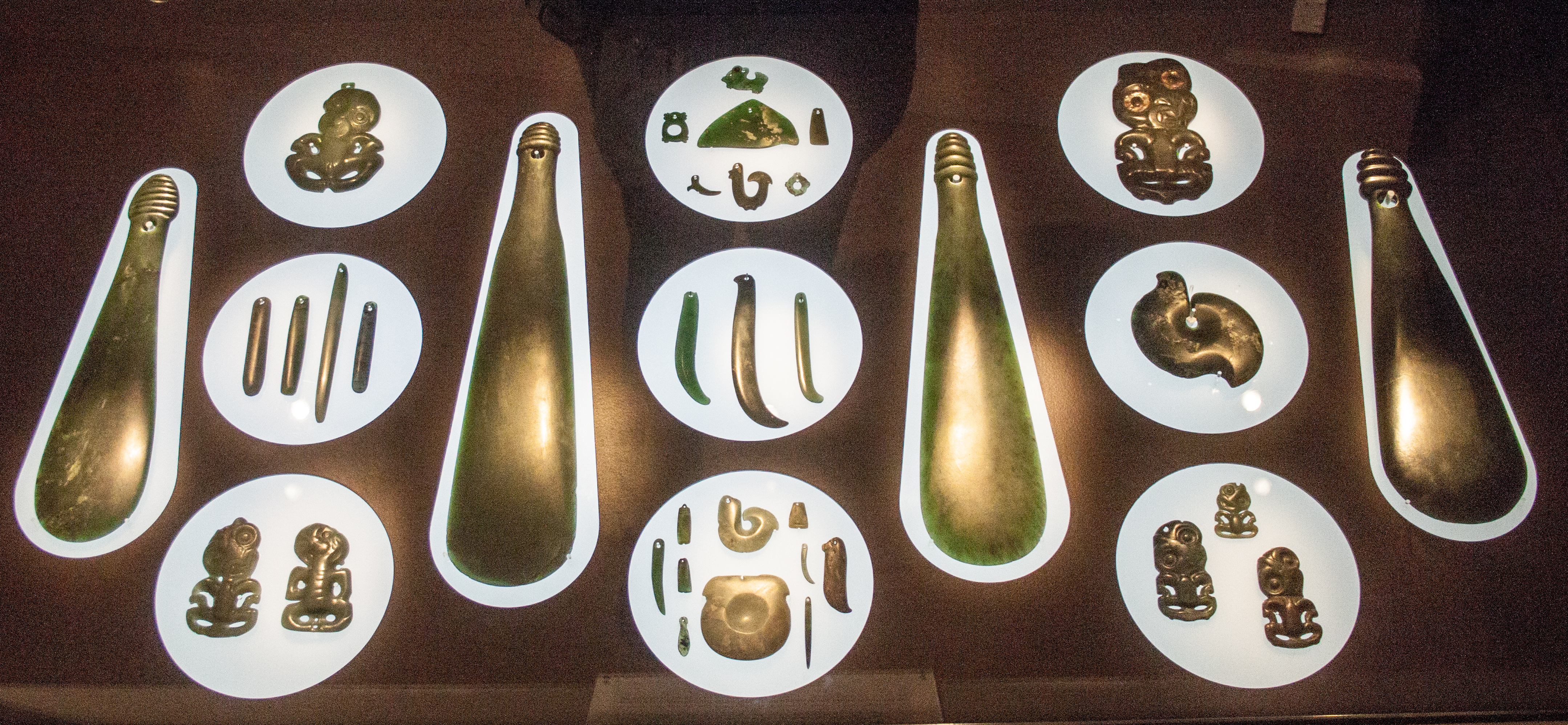 Pounamu objectslabel QS:Len,"Pounamu objects" label QS:Lhu,"Pounamu (új-zélandi nefrit) tárgyak"